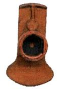 imagen fruto de mi trabajo sobre un rotor de distribuidor (no se observa su marca)